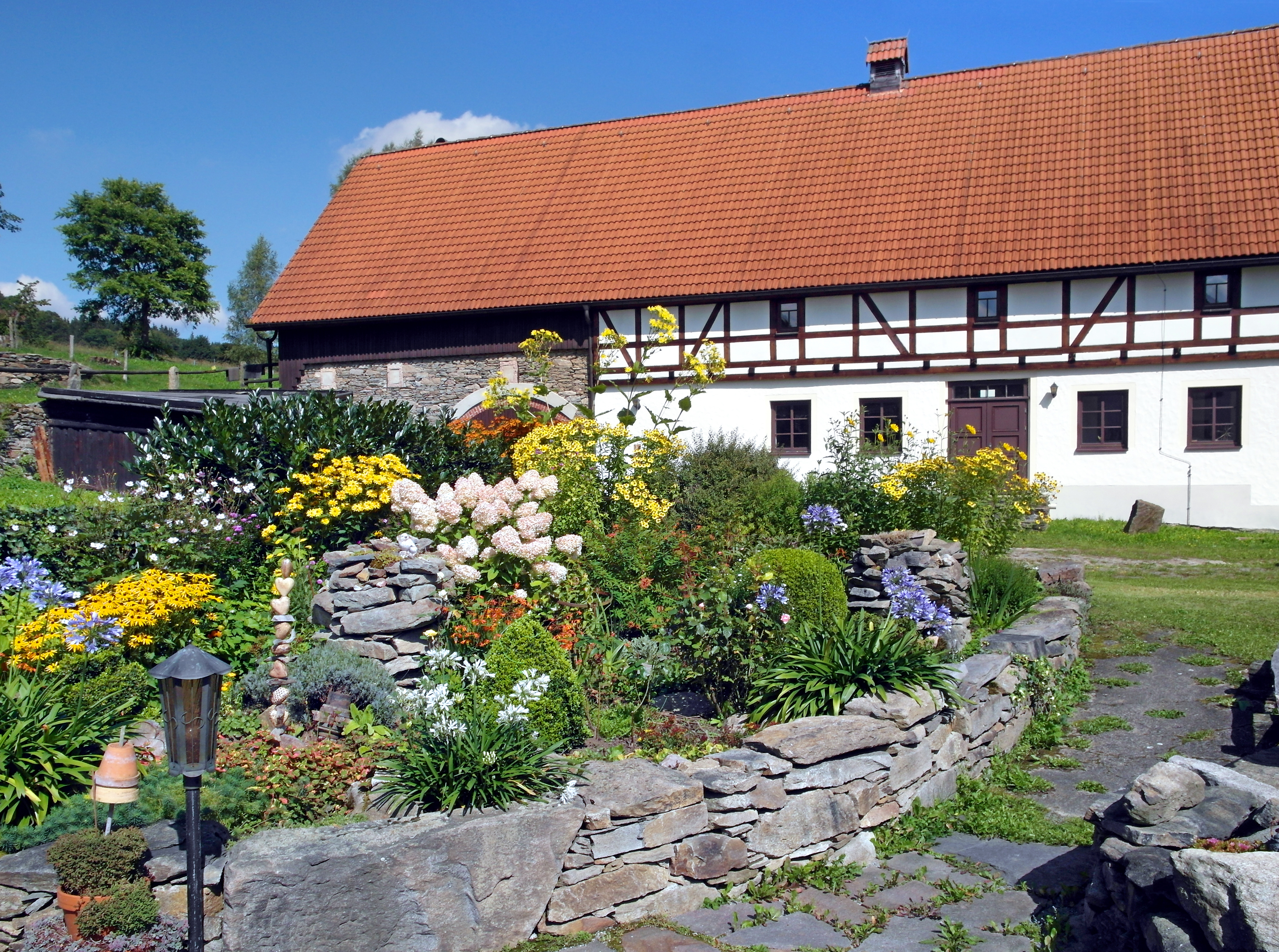 05.09.2017 09488 Neundorf (Thermalbad Wiesenbad), Rittergutsweg / Am Sportplatz (GMP: 50.633550,13.005640): Rittergut Neundorf. Sicht im Gutshof nach Norden. [SAM1724.JPG]20170905130DR.JPG(c)Blobelt